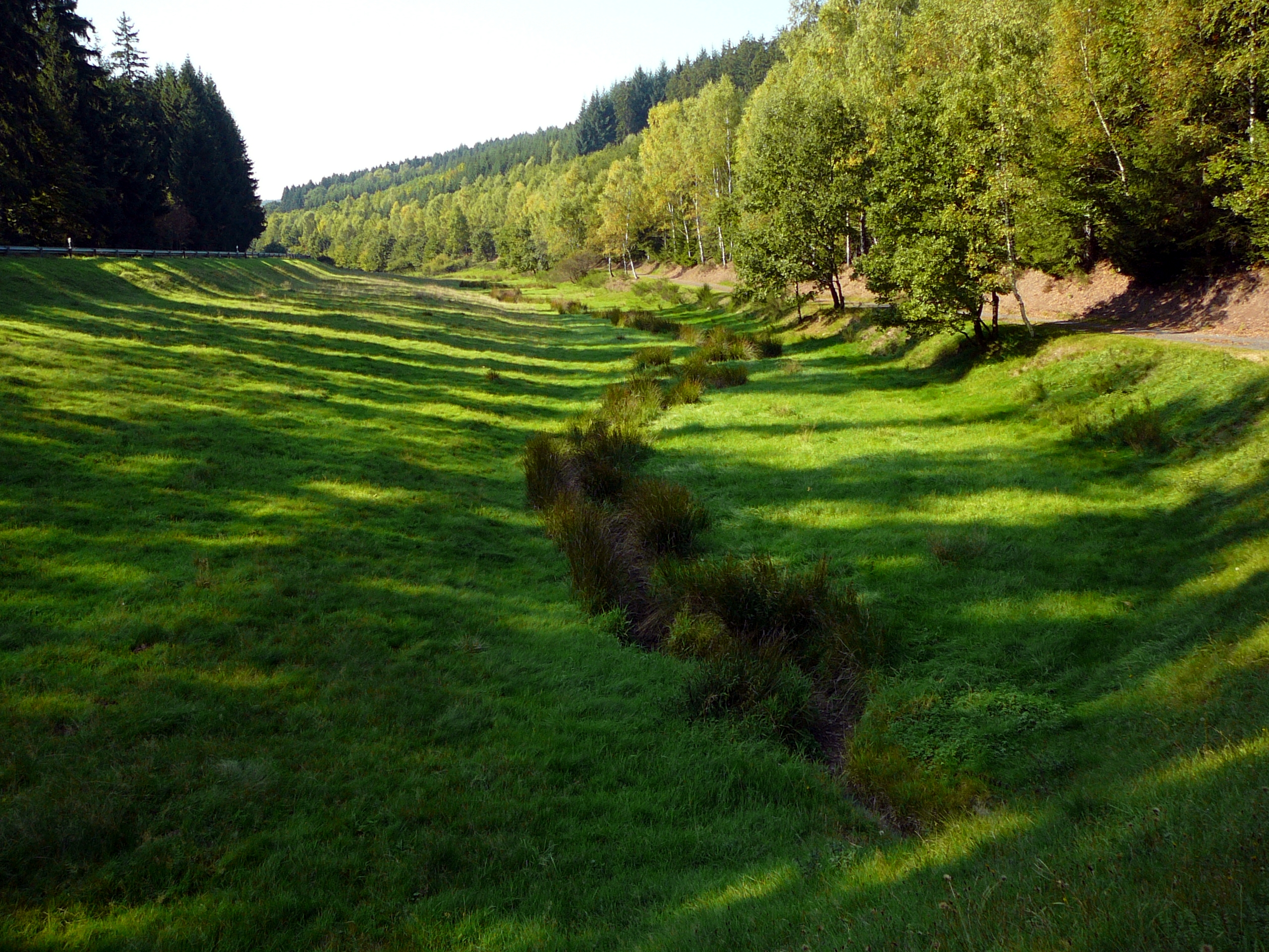 Die junge Jossa zwischen Pfaffenhausen und Lettgenbrunn, Jossgrund, Naturpark Hessischer Spessart.